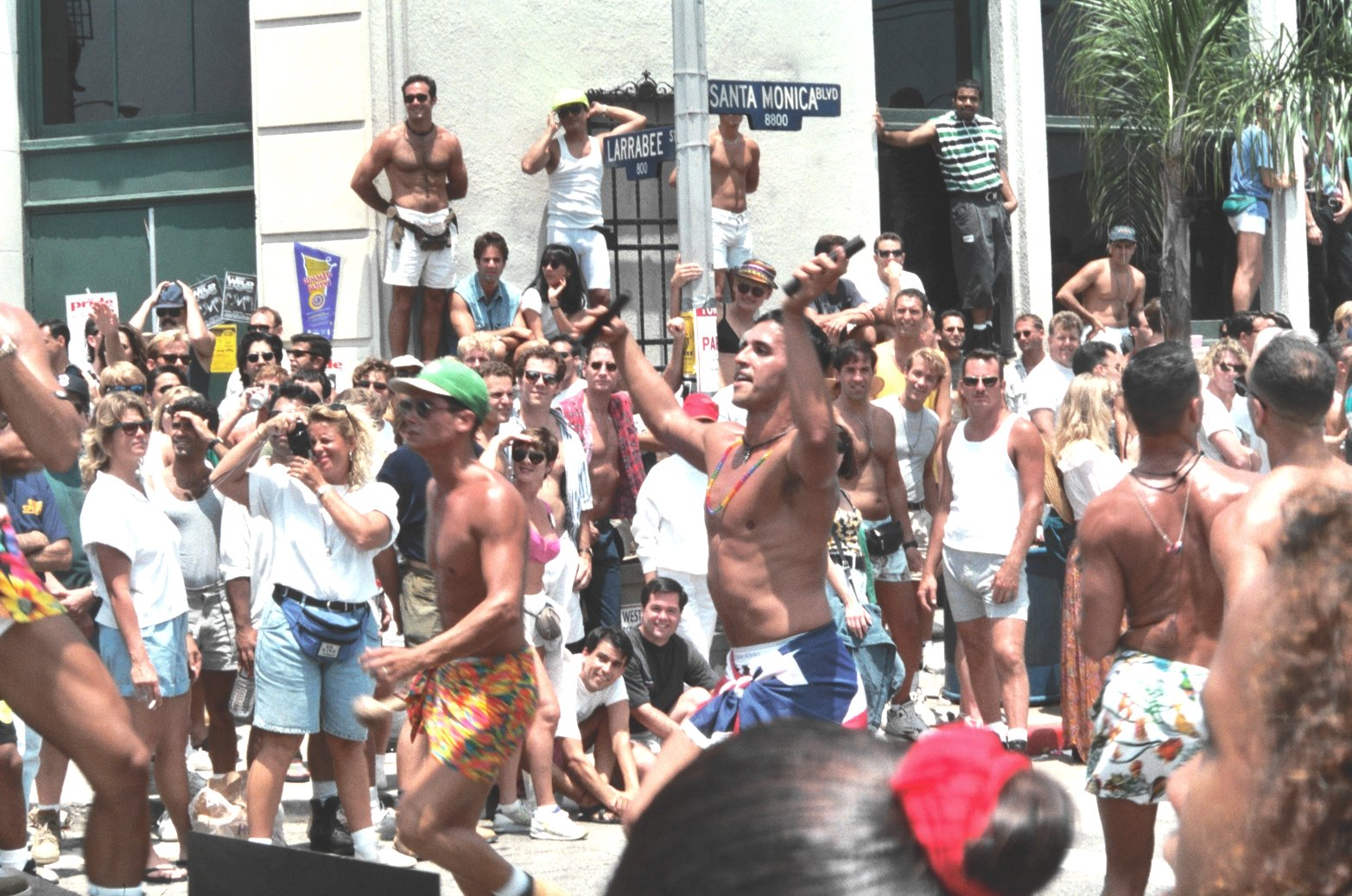 Los Angeles, June 1993